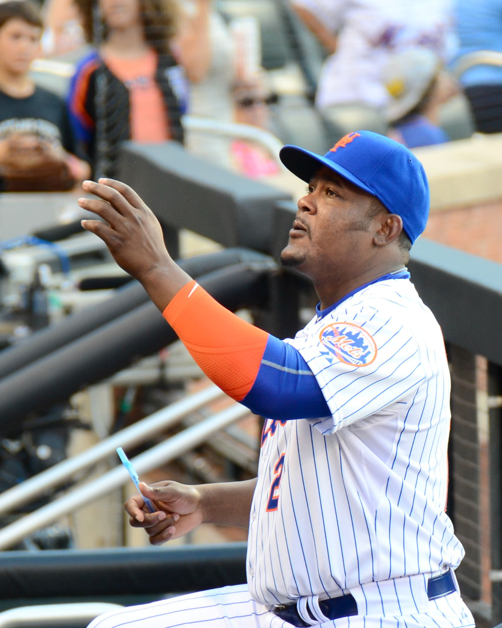 Juan Uribe